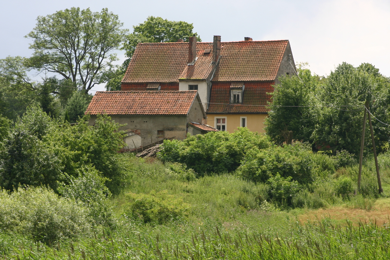 Solanka, Polska, powiat kętrzyński.